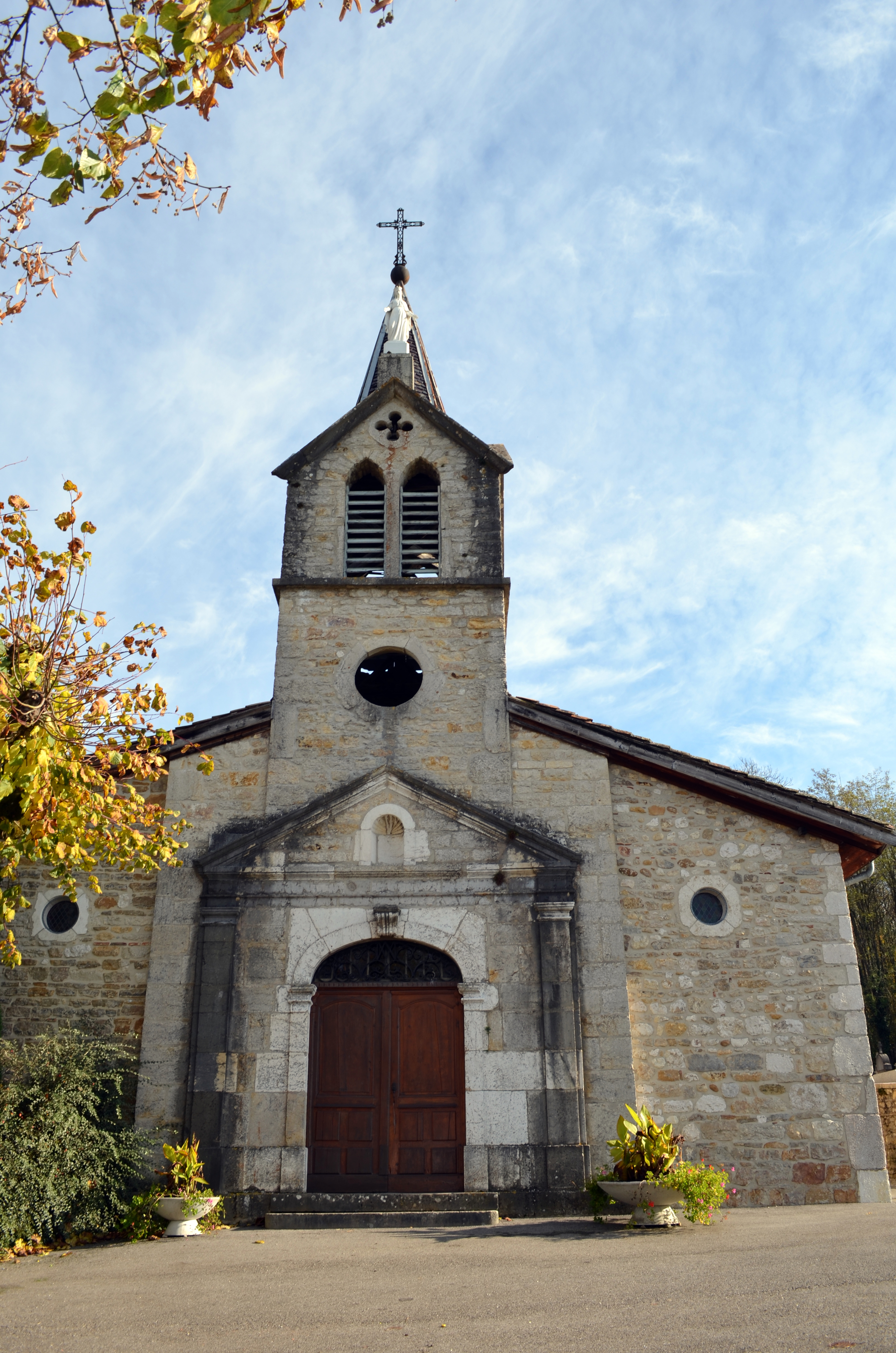 Photographie de Vaux-en-Bugey, Ain, France.